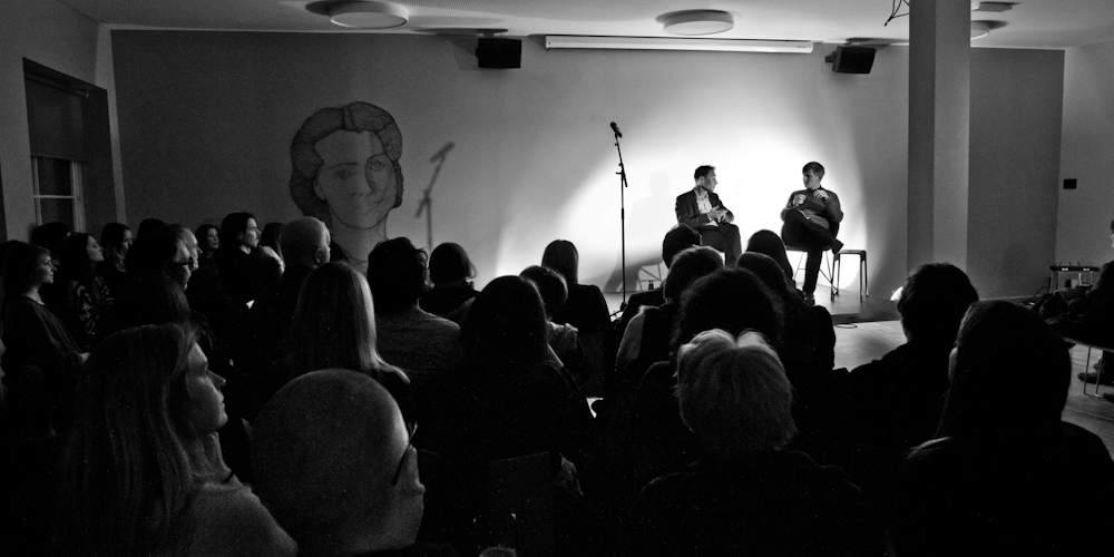 Arrangement på Litteraturhuset i Bergen